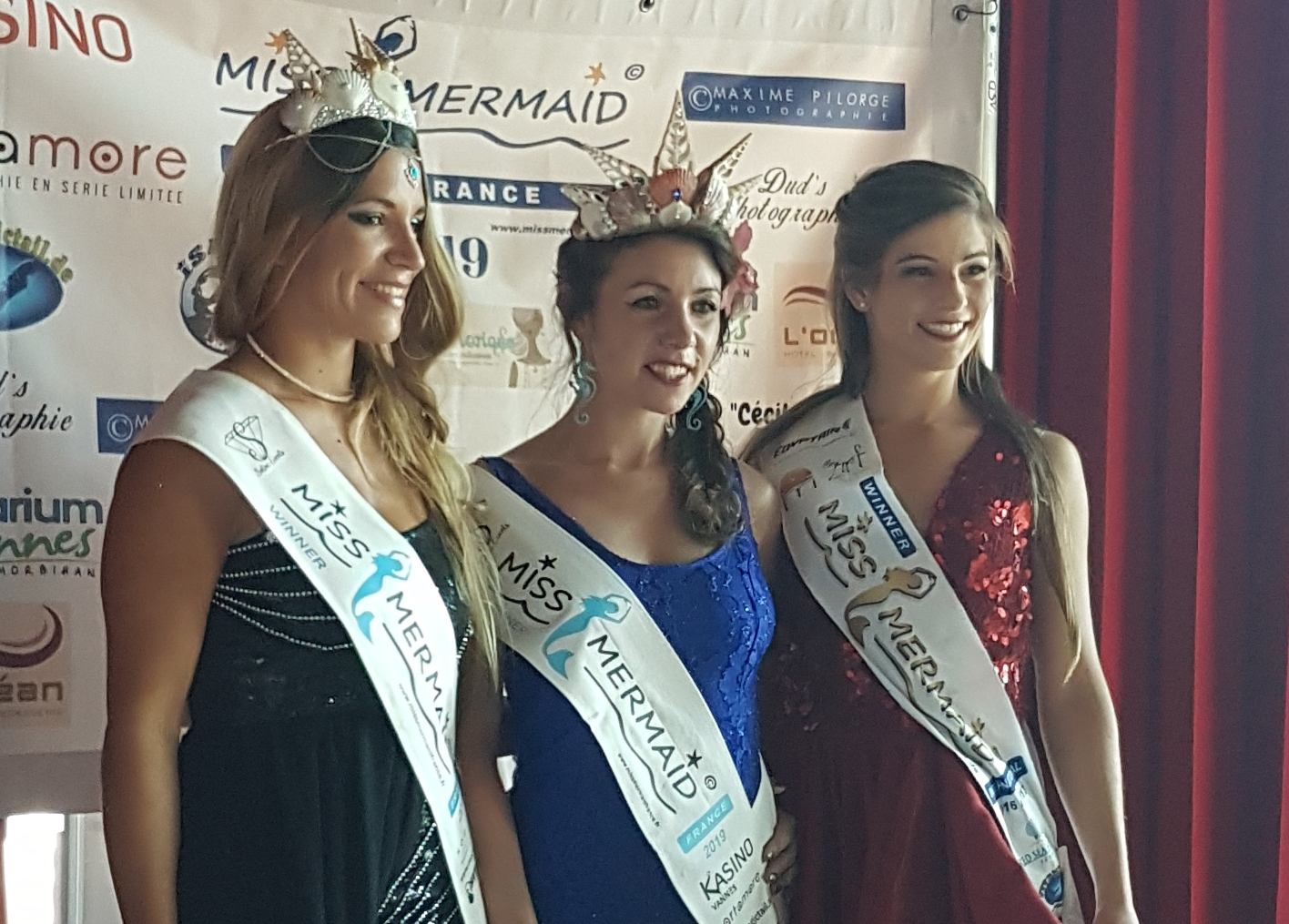 Leslie Parin Miss Mermaid France 2018-2019, Julie Peugeot Miss Mermaid France 2019-2021 et Ingrid Fabulet Miss Mermaid France 2016-2017